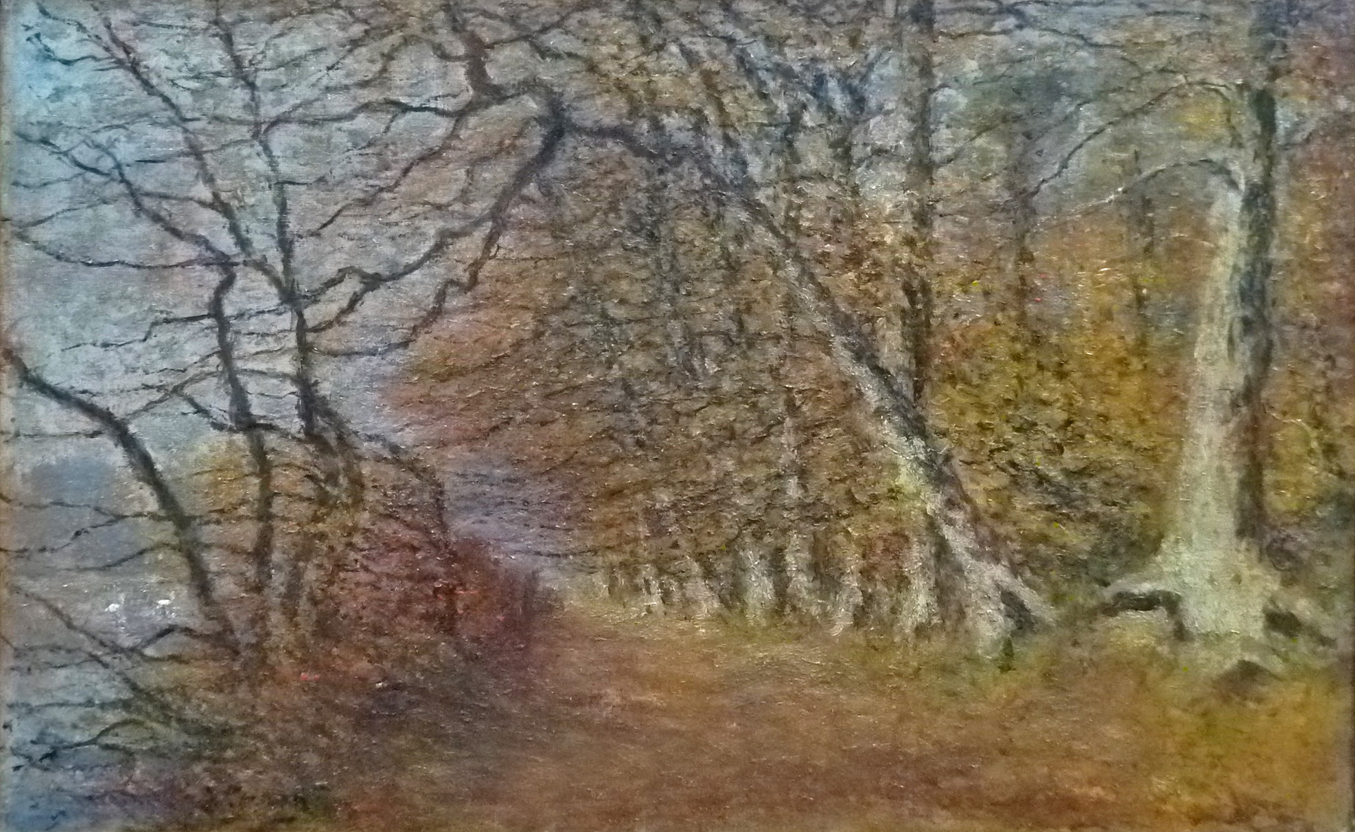 "Belle journée d'automne" olieverf op doek (40 x 60 cm) door de Belgische kunstschilder Joseph Caron (1866-1944)